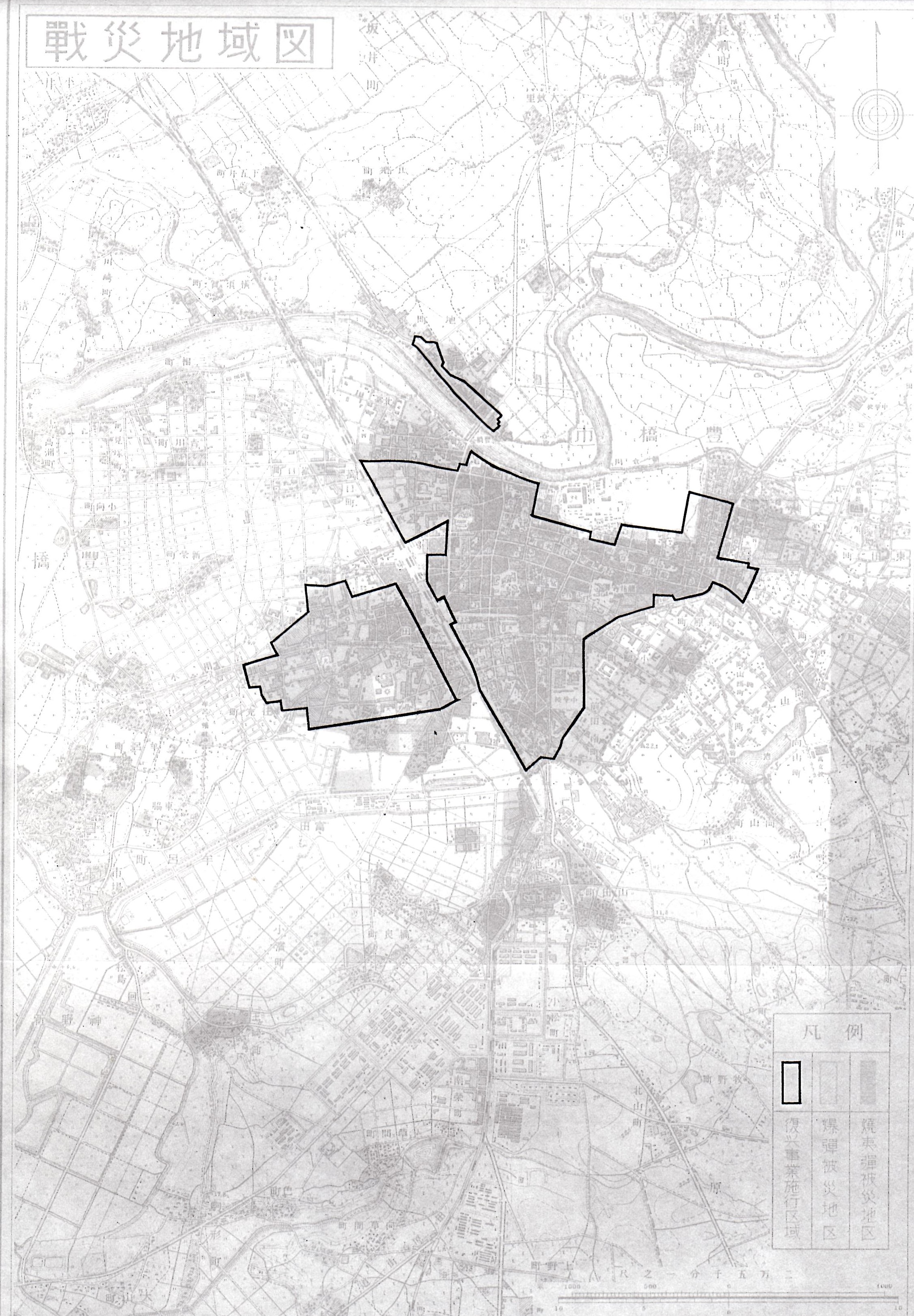 豊橋市における1945年6月の豊橋空襲範囲図。太線は復興事業施工区域。色付き（見づらい）は焼夷弾被災地区。斜め線（見づらい）は爆弾被災地区。